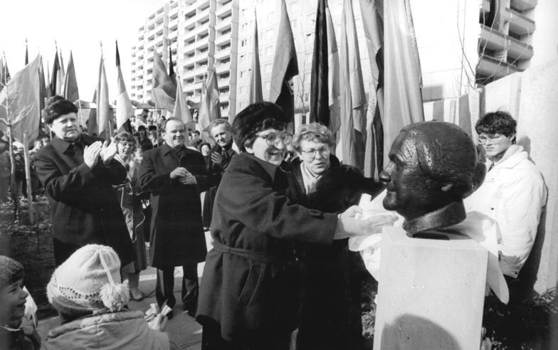 ADN-ZB Mittelstädt 4.3.87 Berlin: XII. DFD-Kongreß- Zetkin-Park. Am Vorabend des XII. Bundeskongresses des DFD erfolgte die Einweihung und Namensgebung des künftigen Wohngebietsparkes "Clara Zetkin" in Marzahn-Nord. Die Vorsitzende des DFD, Ilse Thiele (M.), enthüllte die Clara-Zetkin-Büste, die vom Bildhauer Walter Arnold geschaffen wurde. L. Günter Schabowski, Mitglied des Politbüros und Sekretär des ZK der SED, und Sekretär der Bezirksleitung Berlin. 2.v.l. Erhard Krack, Oberbürgermeister von Berlin. Der Clara-Zetkin-Park ist ein Geschenk der Frauenorganisation an die Hauptstatt der DDR, Berlin, zum 750. Gründungsjubiläum.